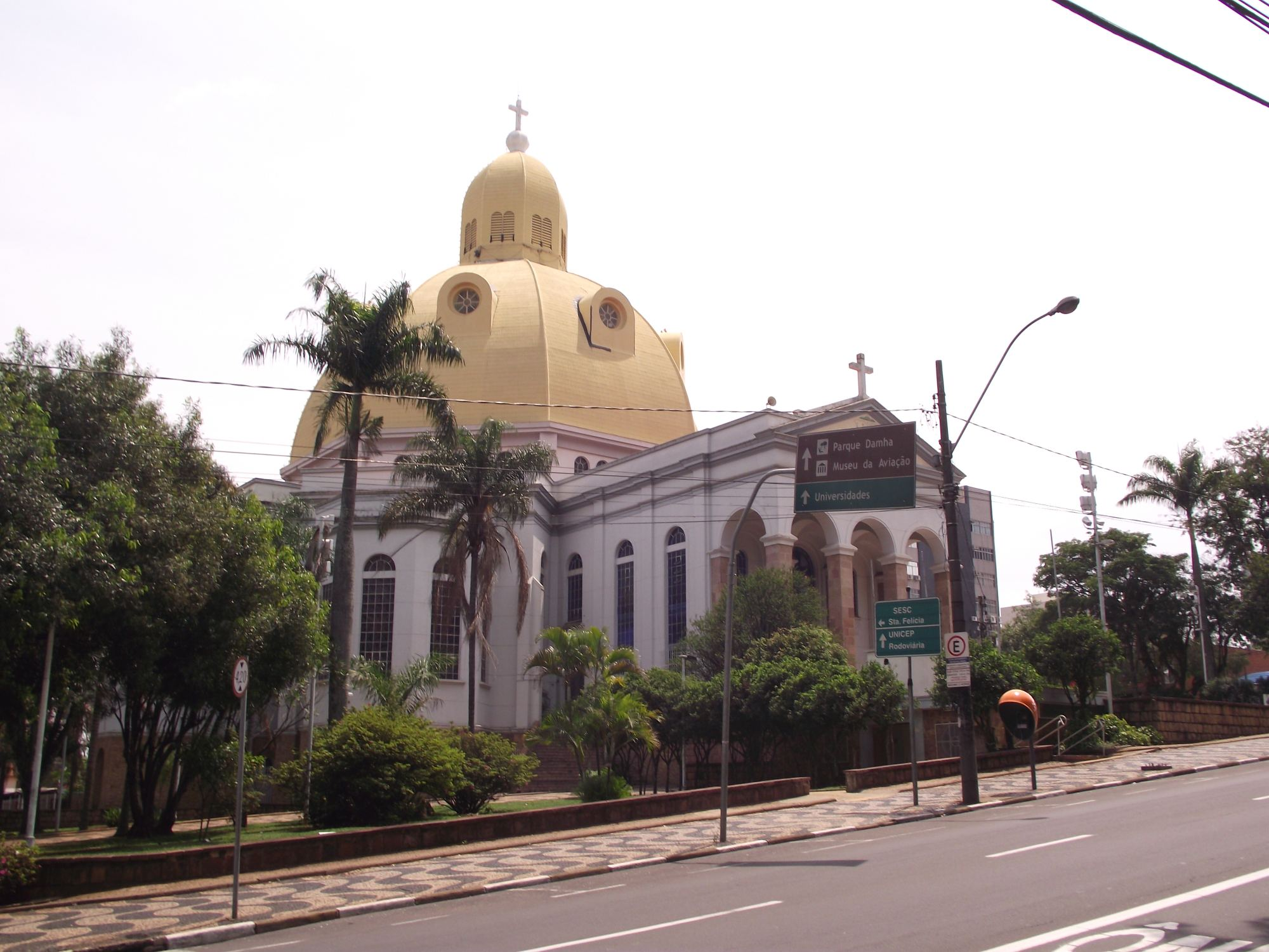 Catedral de São Carlos